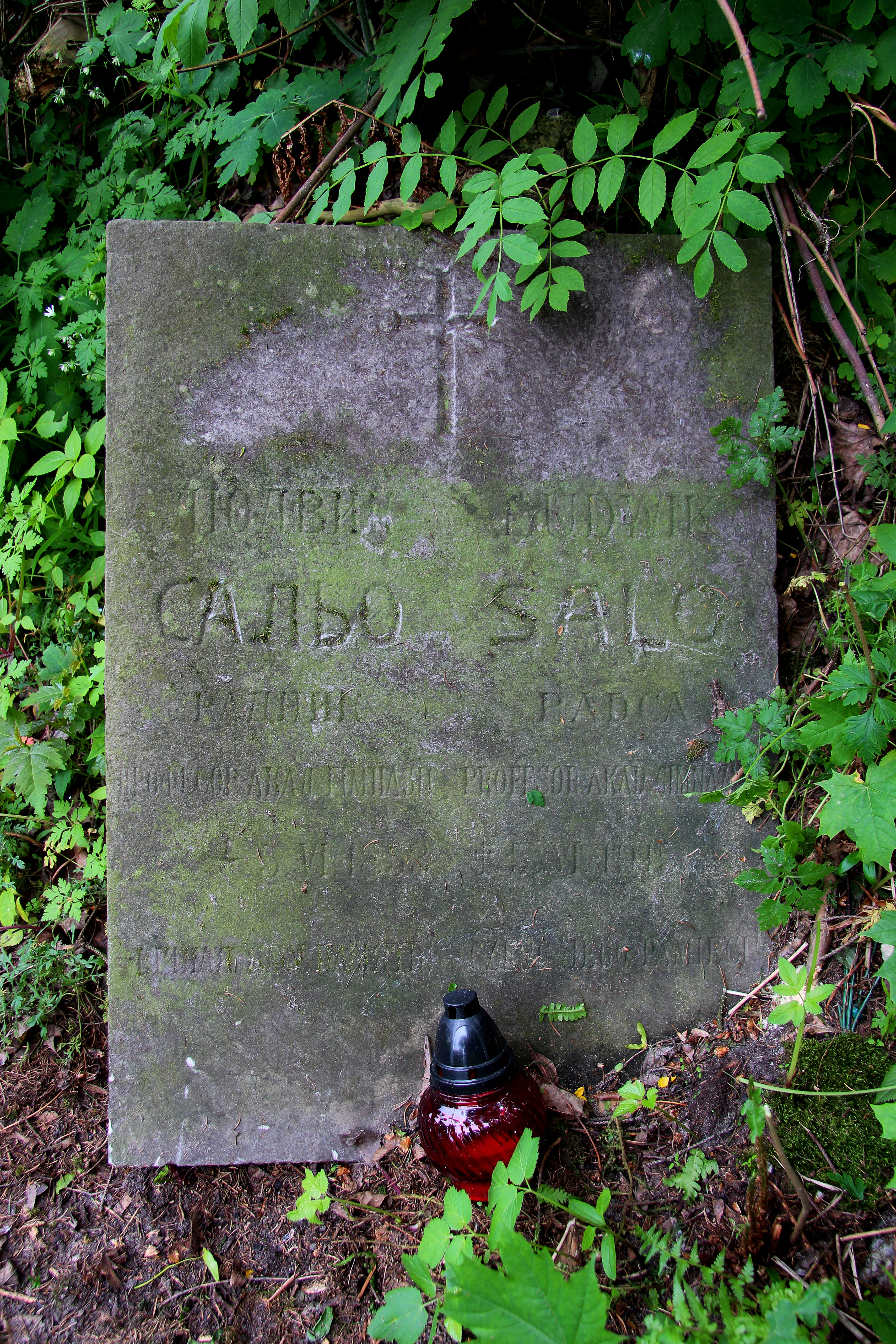 Могила Л. Сальо.Личаківський цвинтар , поле № 61.